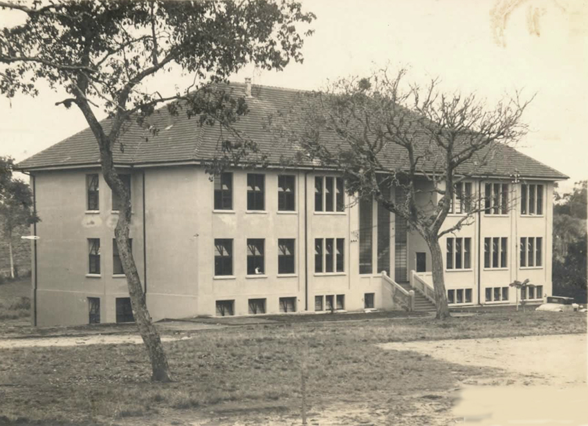 Colégio Sinodal de São Leopoldo, projeto de Theodor Wiederspahn